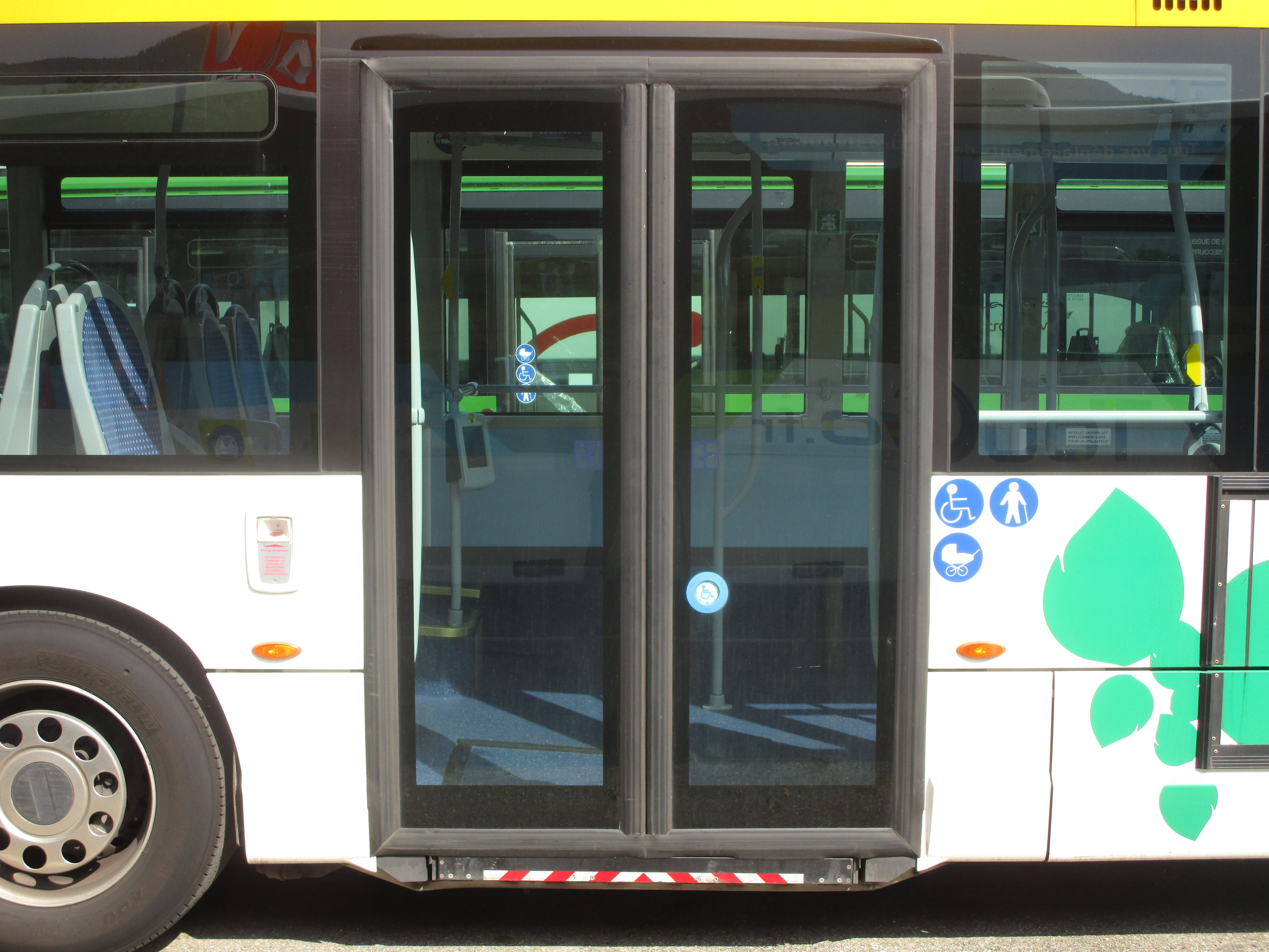 The doors of an Heuliez GX 137L (n°4112 of the French agglomeration community Chambéry Métropole - Cœur des Bauges).